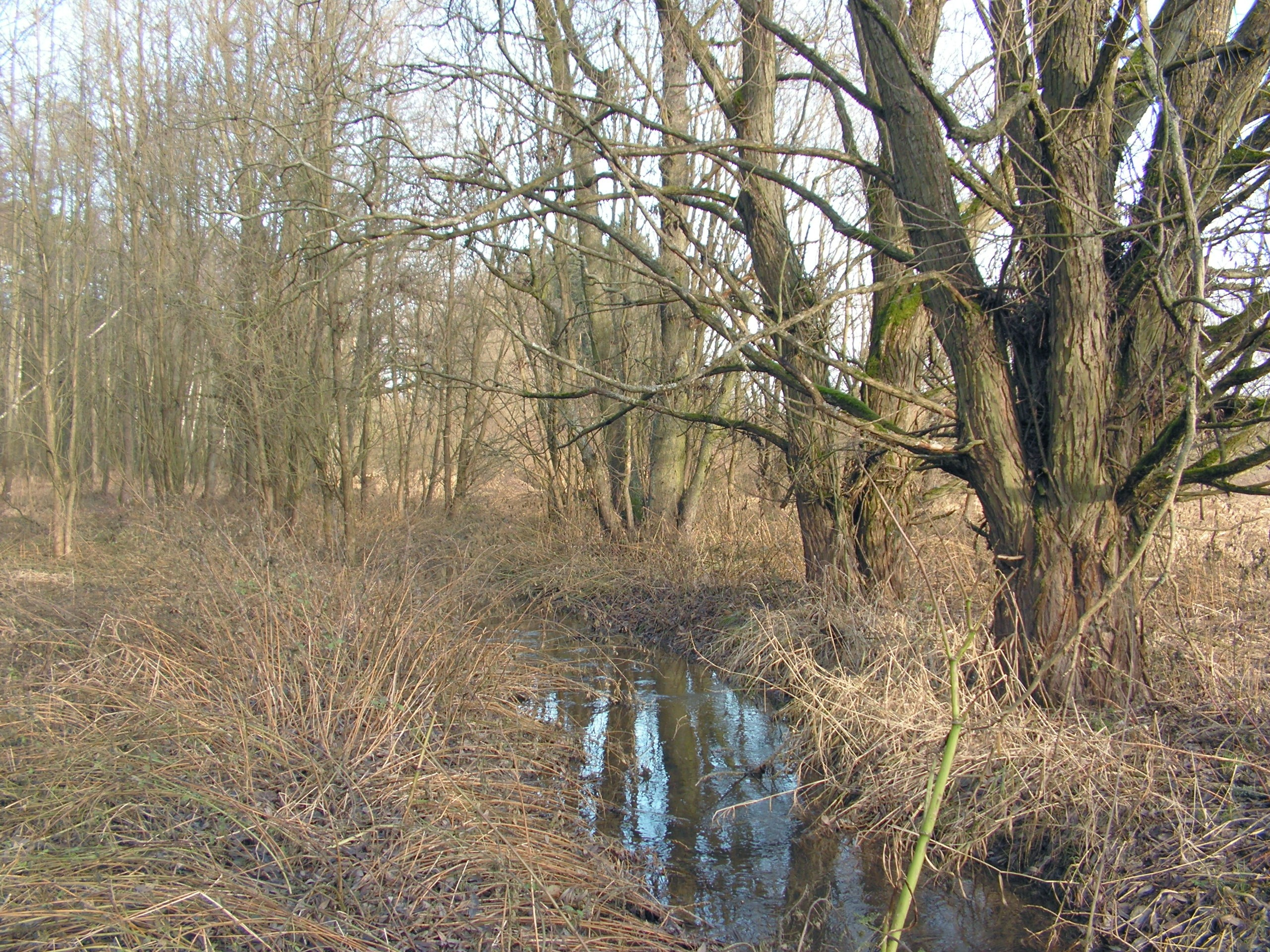 Vepříkovský potok při vtoku do přírodní rezervace Havranka, která se nachází jihozápadně od obce Vepříkov v okrese Havlíčkův Brod.